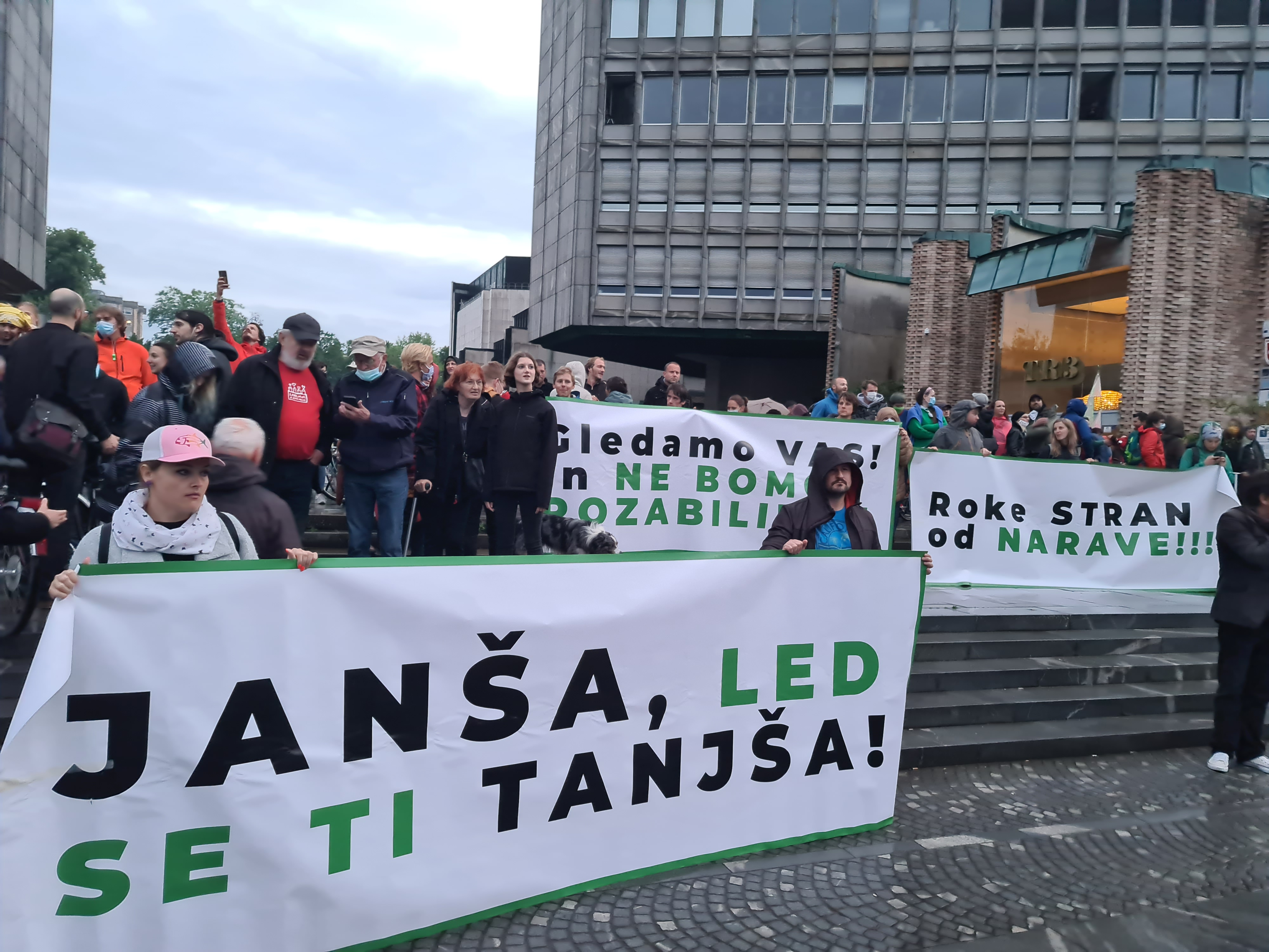 Kolesarski protest 15. maja v Ljubljani.